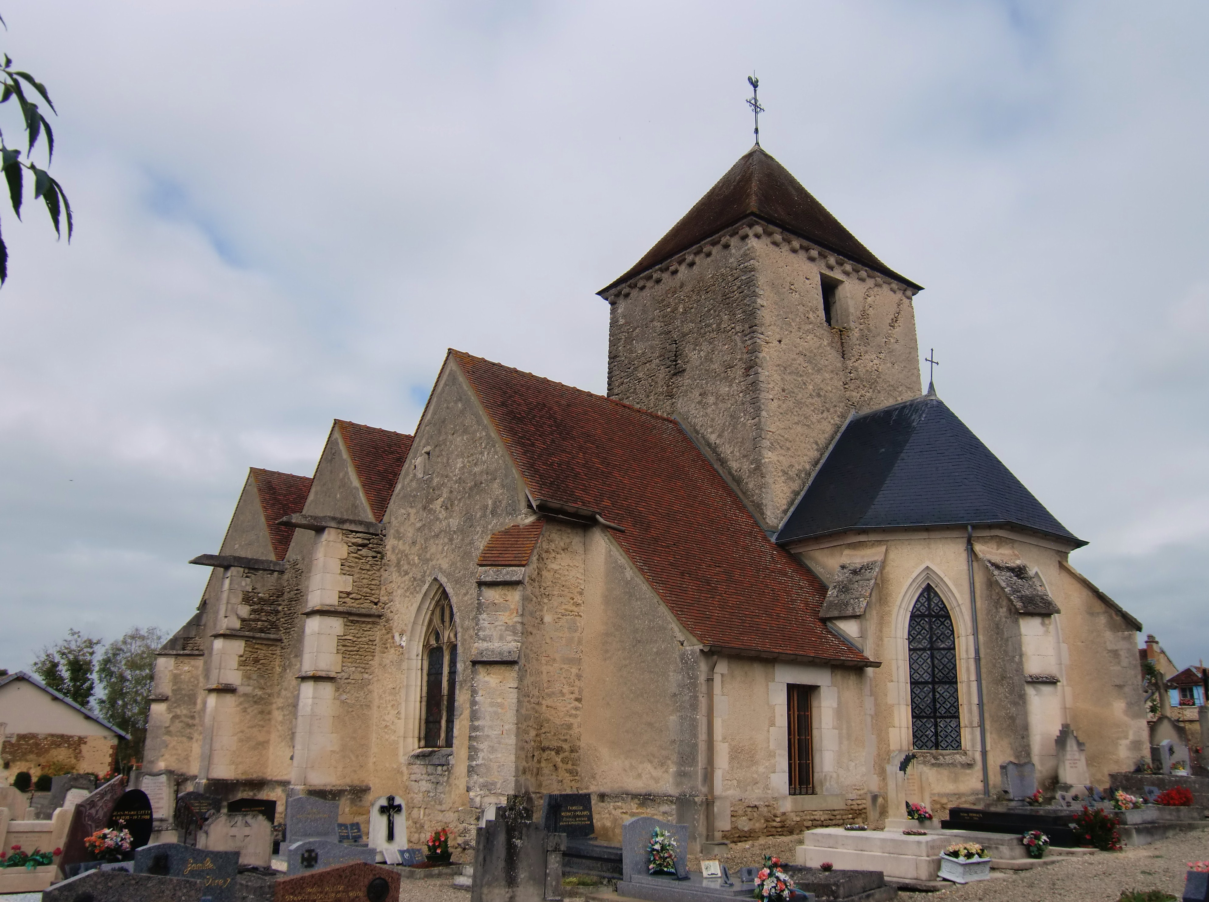 Eglise de Courtenot (Aube - Champagne - France)